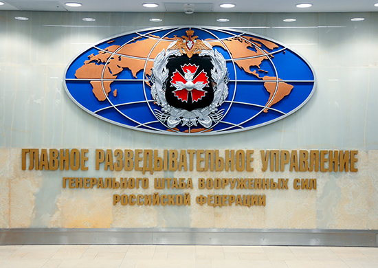 Эмблема в Главном разведывательном управлении Генерального штаба Вооруженных Сил